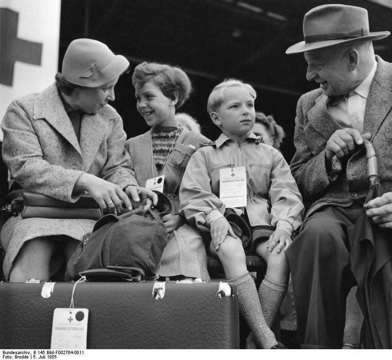 Kinder-Lift, 6. Juli 1955 Rund 1800 Kinder aus Berlin wurden mit amerikanischen Militärmaschinen zu ihren Ferieneltern in die Bundesrepublik abgeflogen. Die Kinder erhalten die letzten Ratschläge auf dem Flughafen Berlin-Tempelhof.